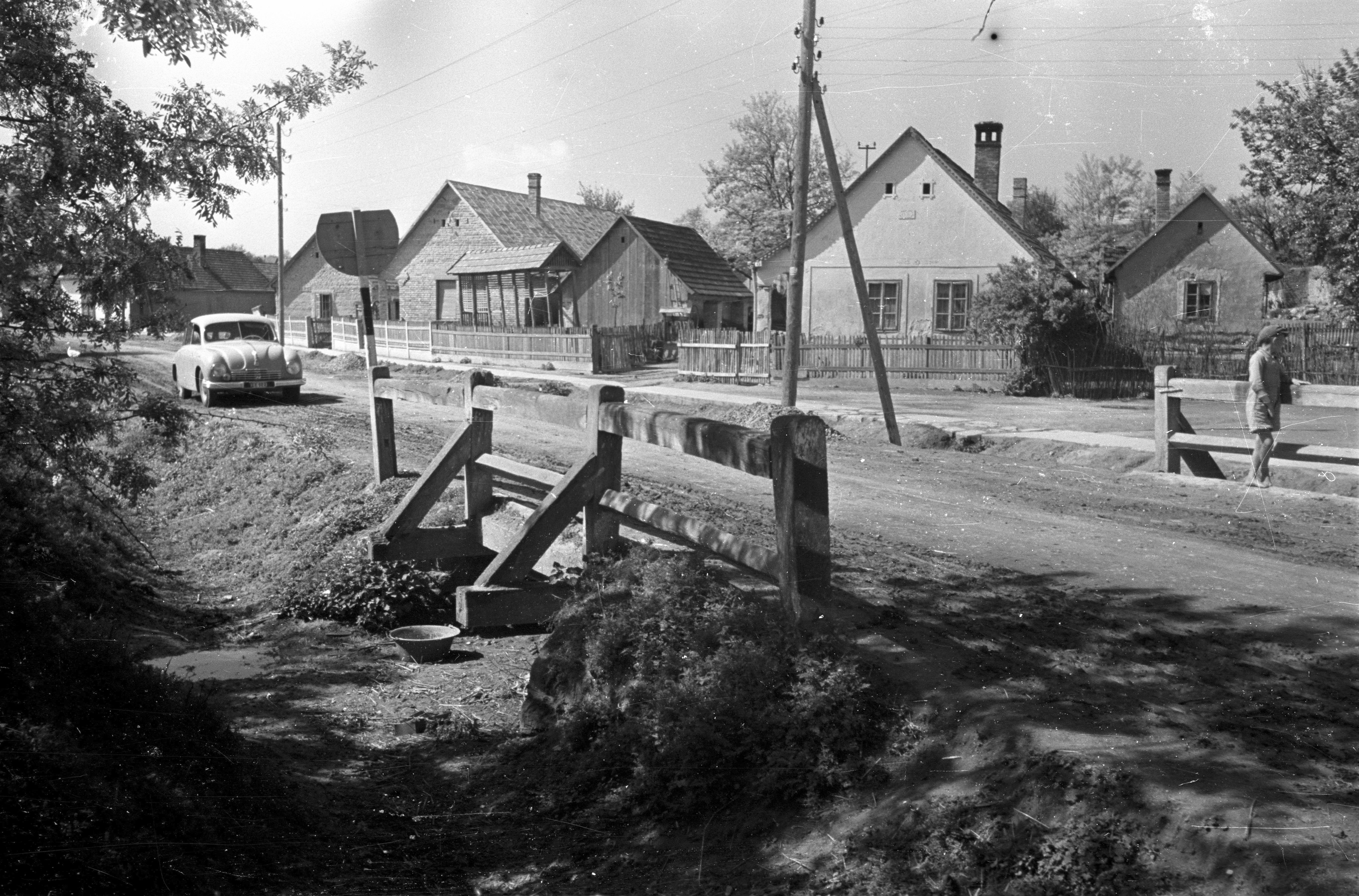 Fő utca. Location: Hungary, Vértesacsa Tags: street view Title: Fő utca.